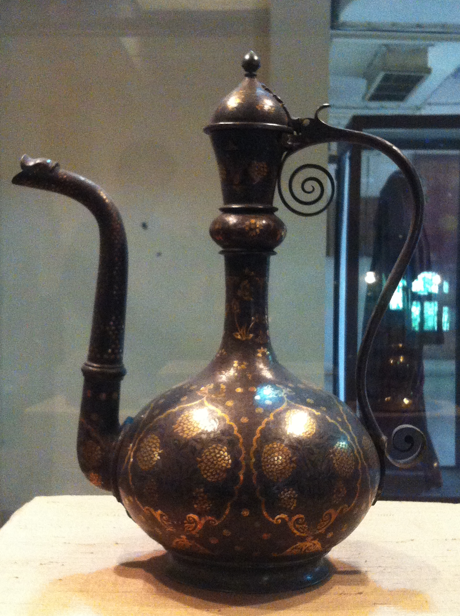 बीदरी एक लोककला है जो की कर्नाटक के बीदर शहर से शुरु हुआ था । और बाद मे धीरे-धीरे इस कला का उपयोग आन्ध्र प्रदेश के हैदराबाद शहर मे भी होने लगा ।